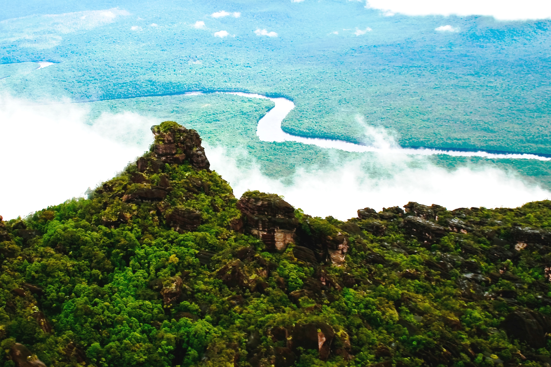 Vista de la selva amazónica venezolana desde la cima de un tepuy. Flickr description: El tepuy es una meseta especialmente abrupta, con paredes verticales y cimas muy planas (aunque no aplica en todos los casos), compuesta de cuarcitas y areniscas con algunos lechos delgados de pizarra, característicos del denominado Escudo de las Guayanas principalmente en la zona de la Gran Sabana venezolana. Igualmente es posible encontrar estas singulares formaciones en menores cantidades en países vecinos como Guyana, Brasil y Colombia. Estas montañas son las formaciones expuestas más antiguas en el planeta: su origen data del Precámbrico. Son un complejo entre la frontera norte del río Amazonas y el Orinoco, entre la costa Atlántica y el Río Negro. A lo largo del curso de la historia de Tierra, la meseta se erosionó, y se formaron los tepuis.